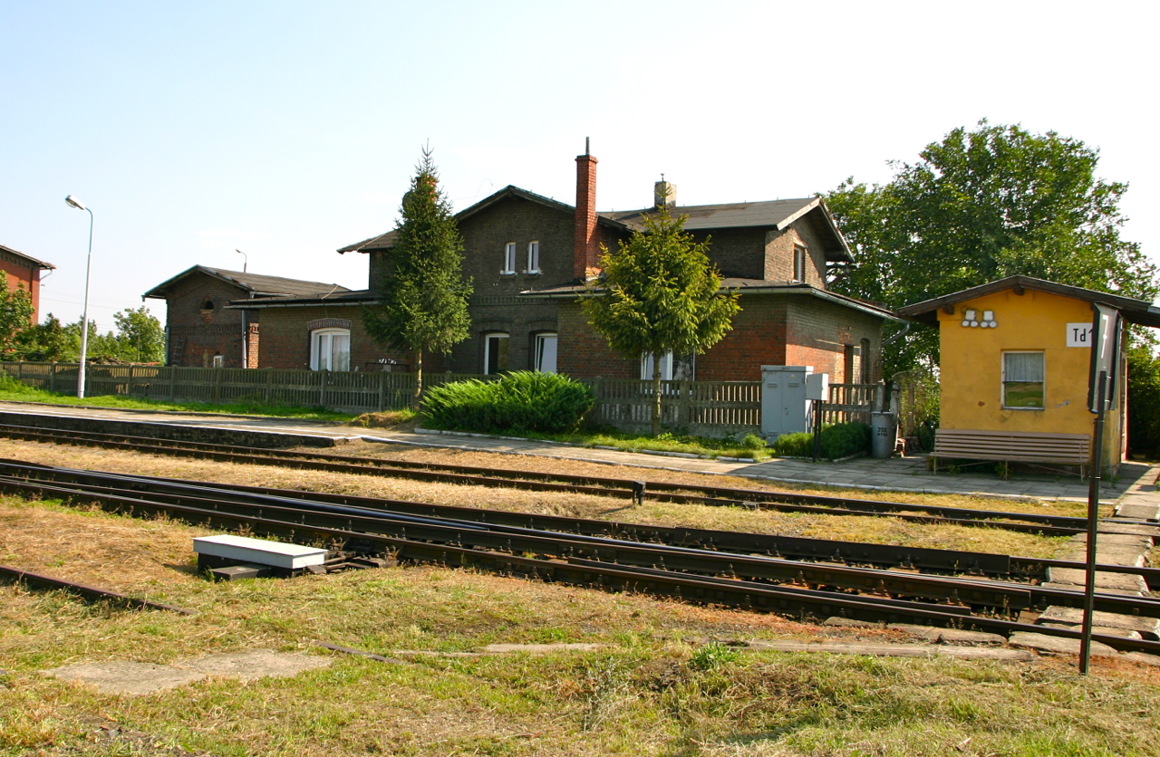 Twardawa – stacja kolejowa